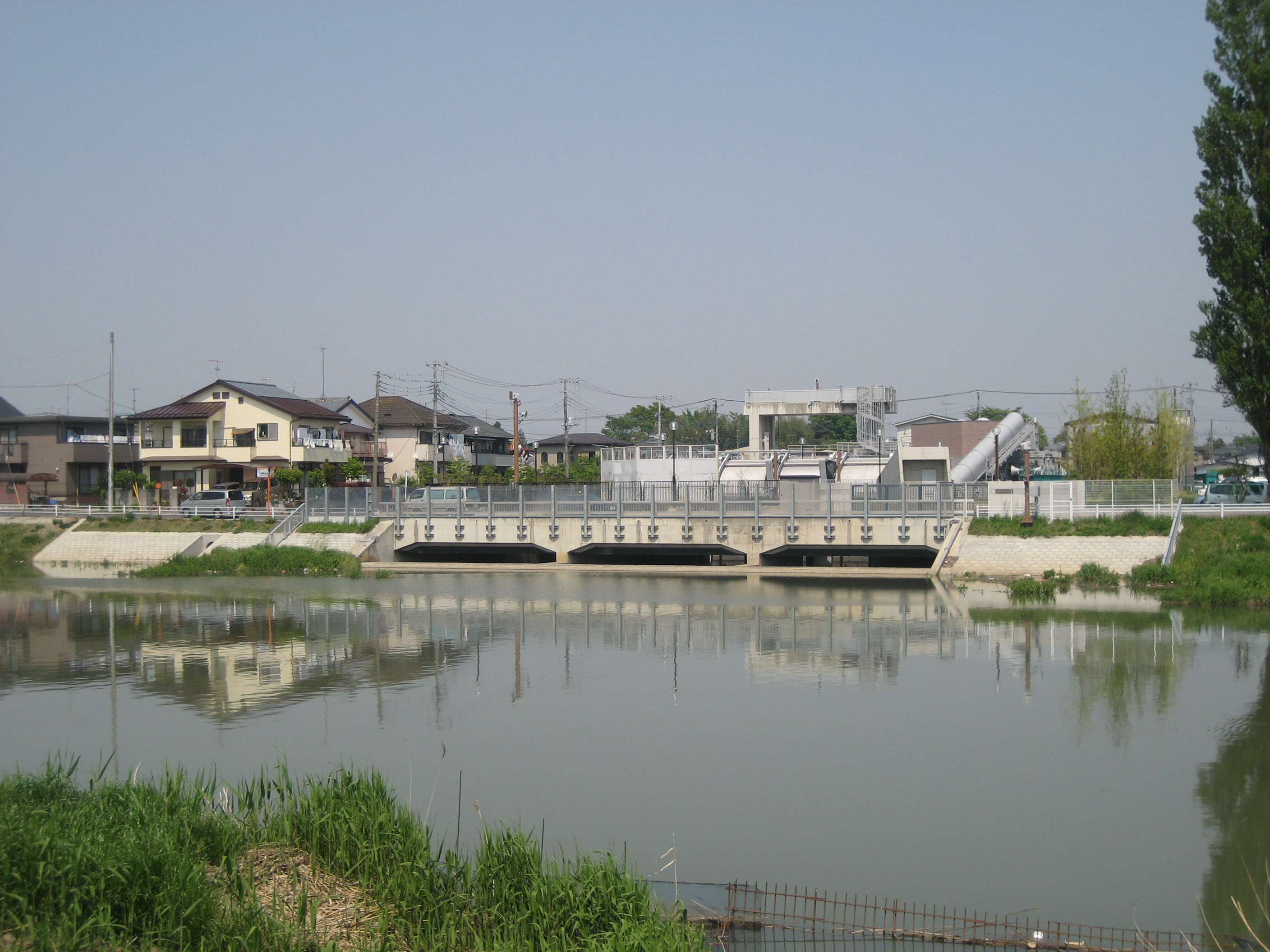 首都圏外郭放水路第五立坑（大落古利根川）